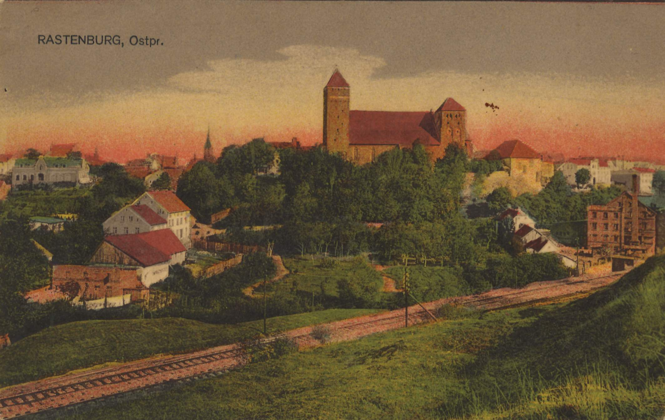 Stadtansicht